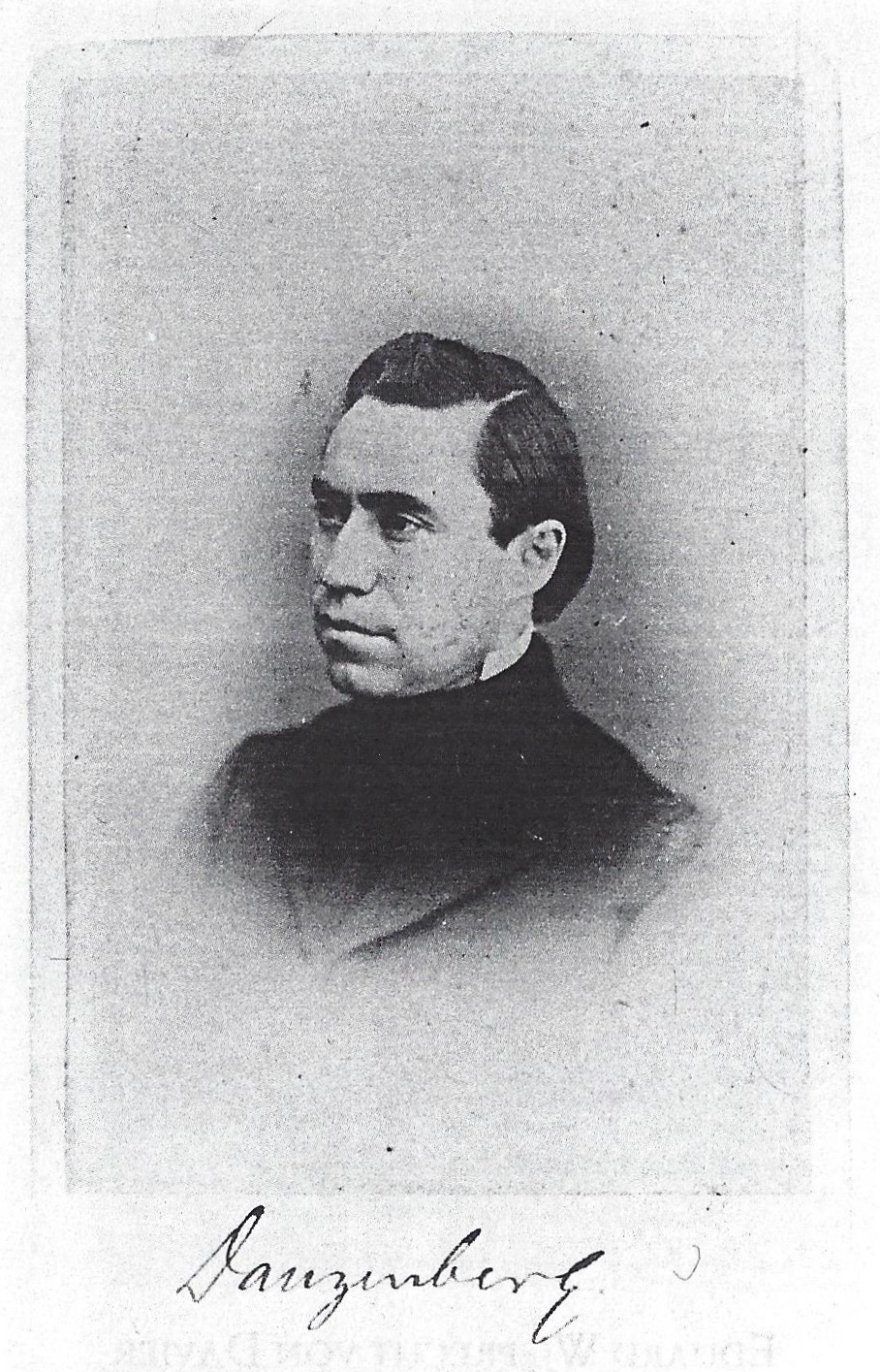 Signierte Porträtfotografie von Johann Aloys Dauzenberg (1831-1907)